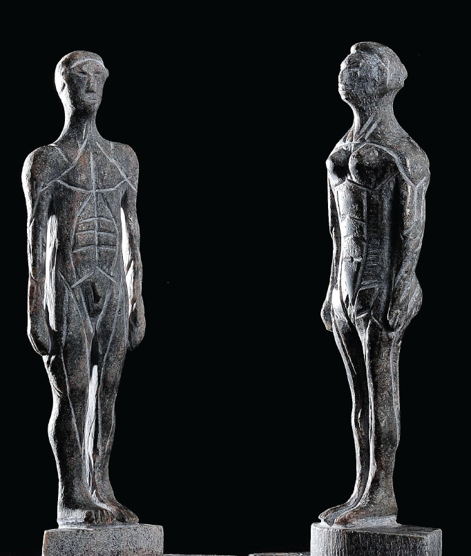 Eng Koppel